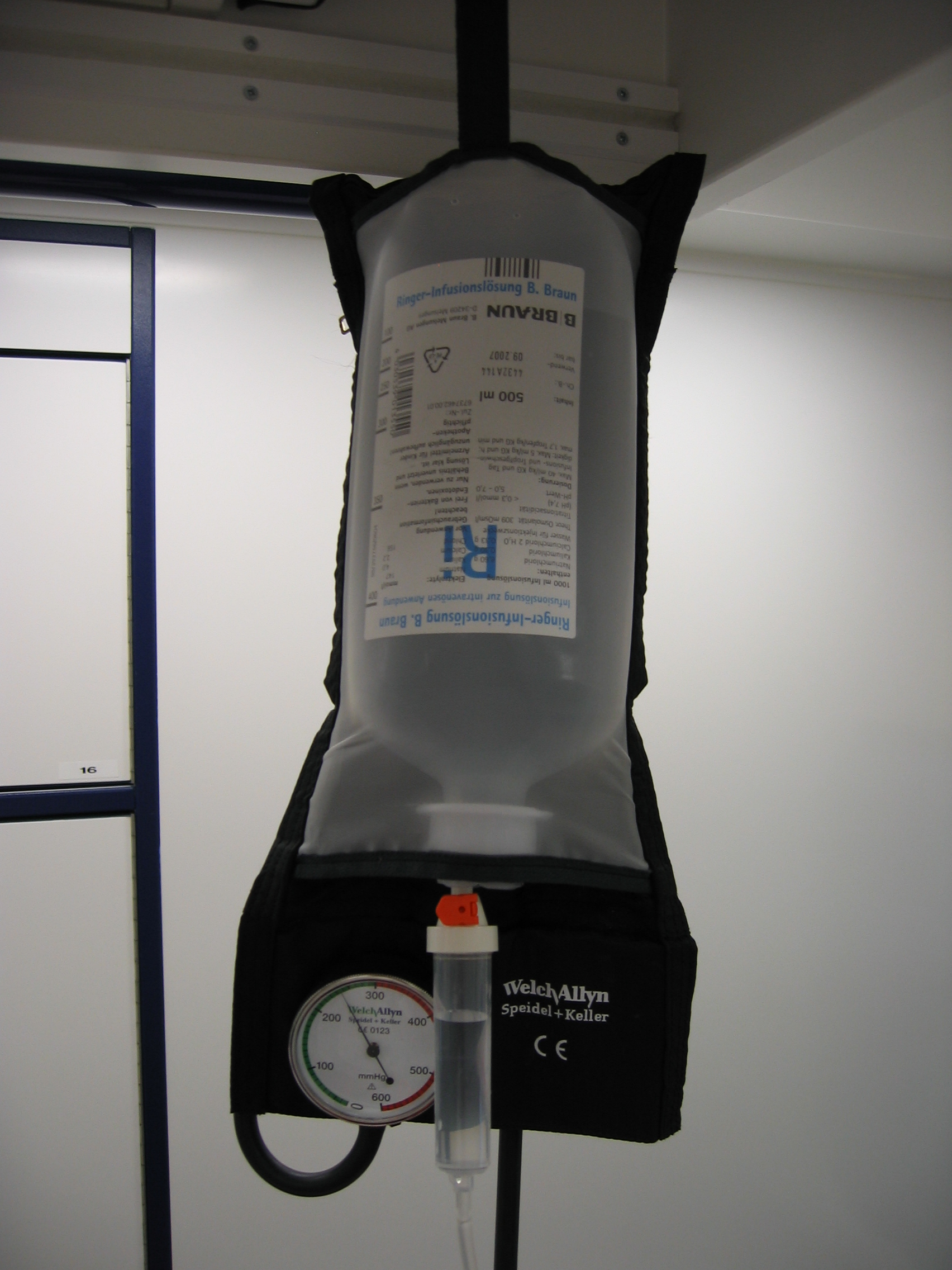 Druckinfusionsmanschette